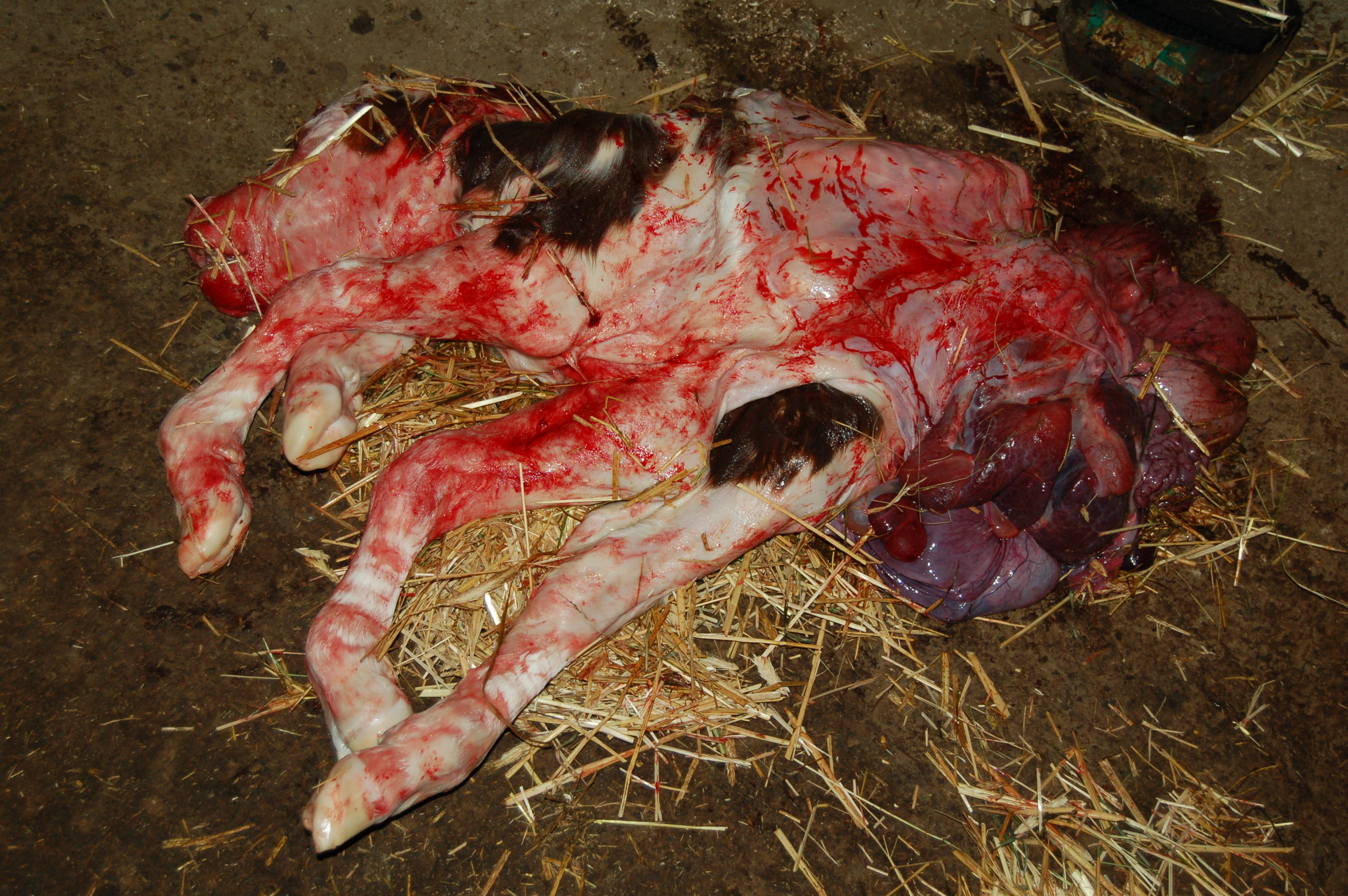 Eine Missbildung bei einem Kalb